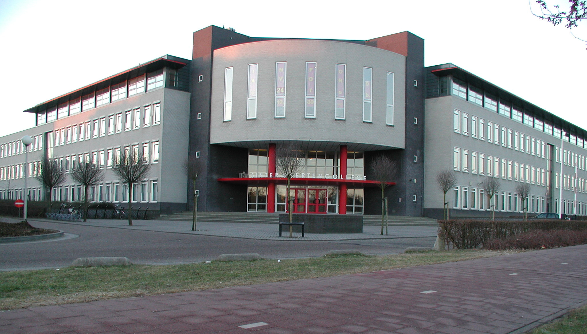 Sintermeertencollege, facade